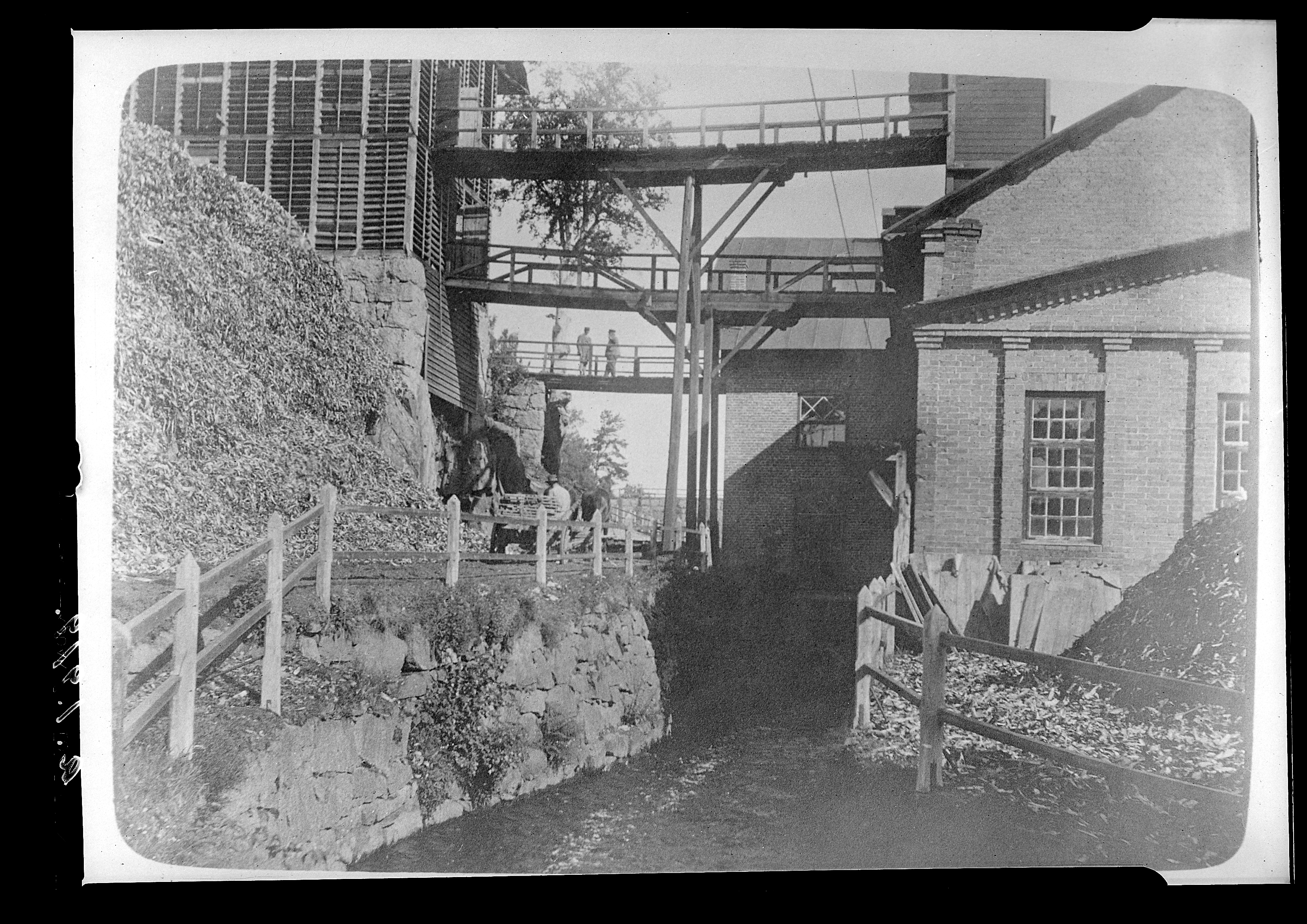 Pappfabriken i Verperyd i Ronneby, Blekinge. Fabriken var i gång mellan 1882-1916.